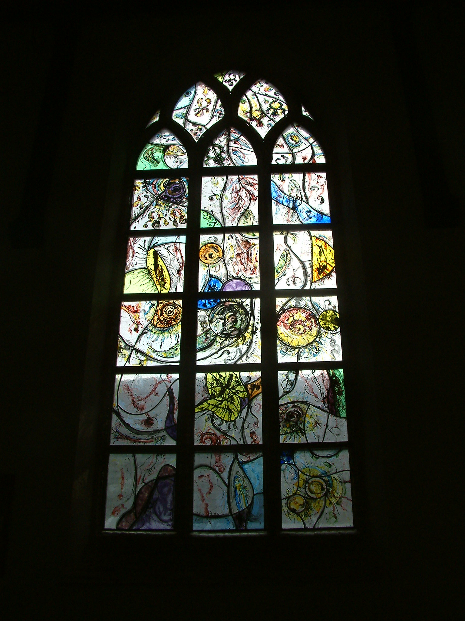 Hervormde kerk van Rhoon De Schepping